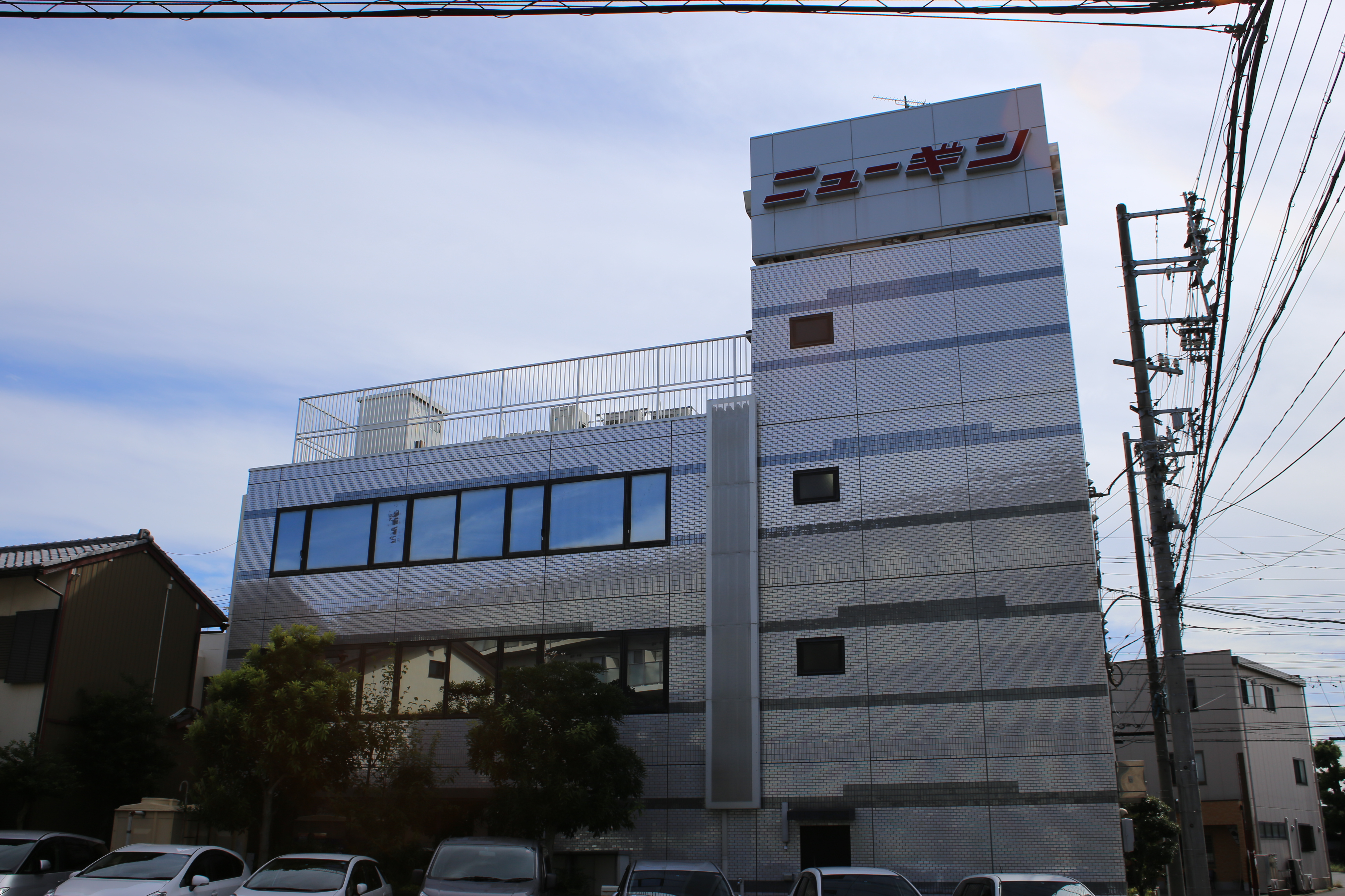 名古屋市中村区烏森町のニューギン本社を北側公道西側より撮影